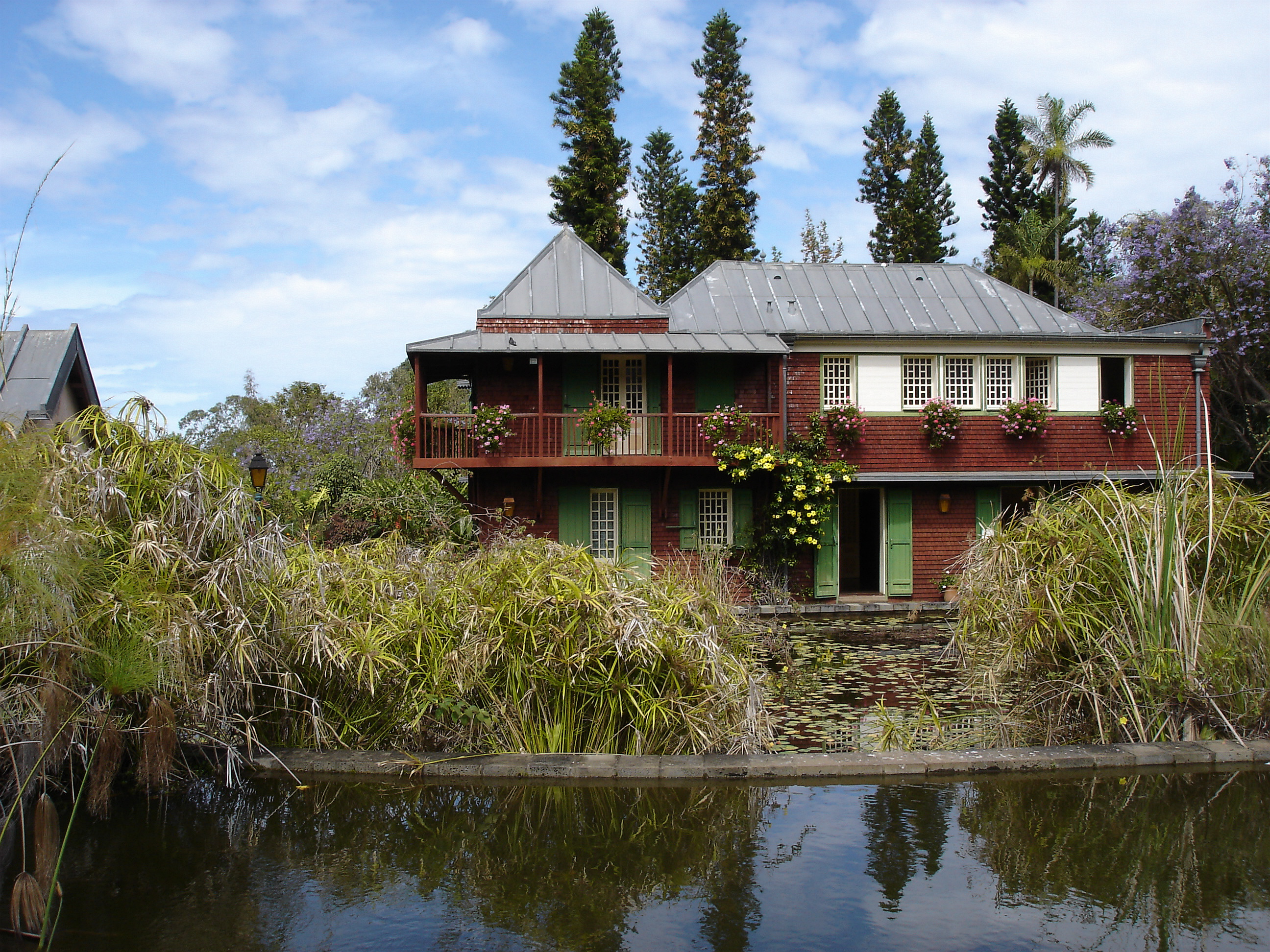 Description: Conservatoire botanique de Mascarin, Sechium edule, novembre 2004, La Réunion Source: Bouba